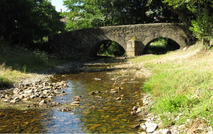 Puente Cantería (Cereceda de la Sierra)